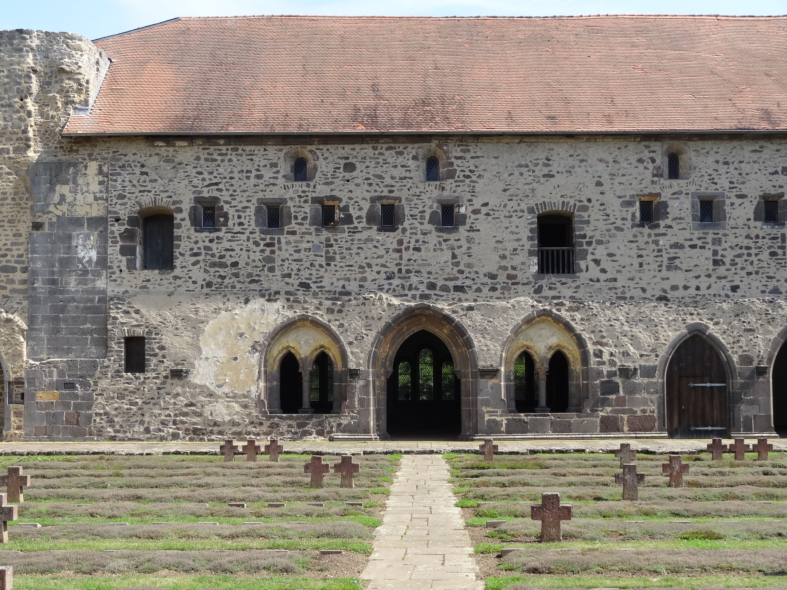 Kloster Arnsburg (Kreuzgang und Kriegsopferfriedhof)